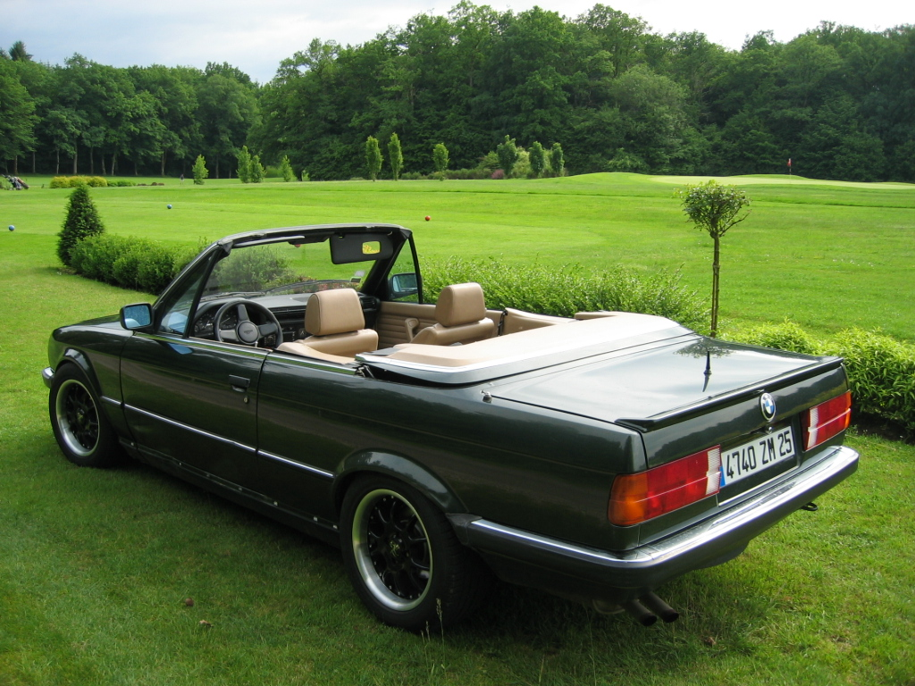 BMW 320 E30 CABRIOLET 6 Cylindres